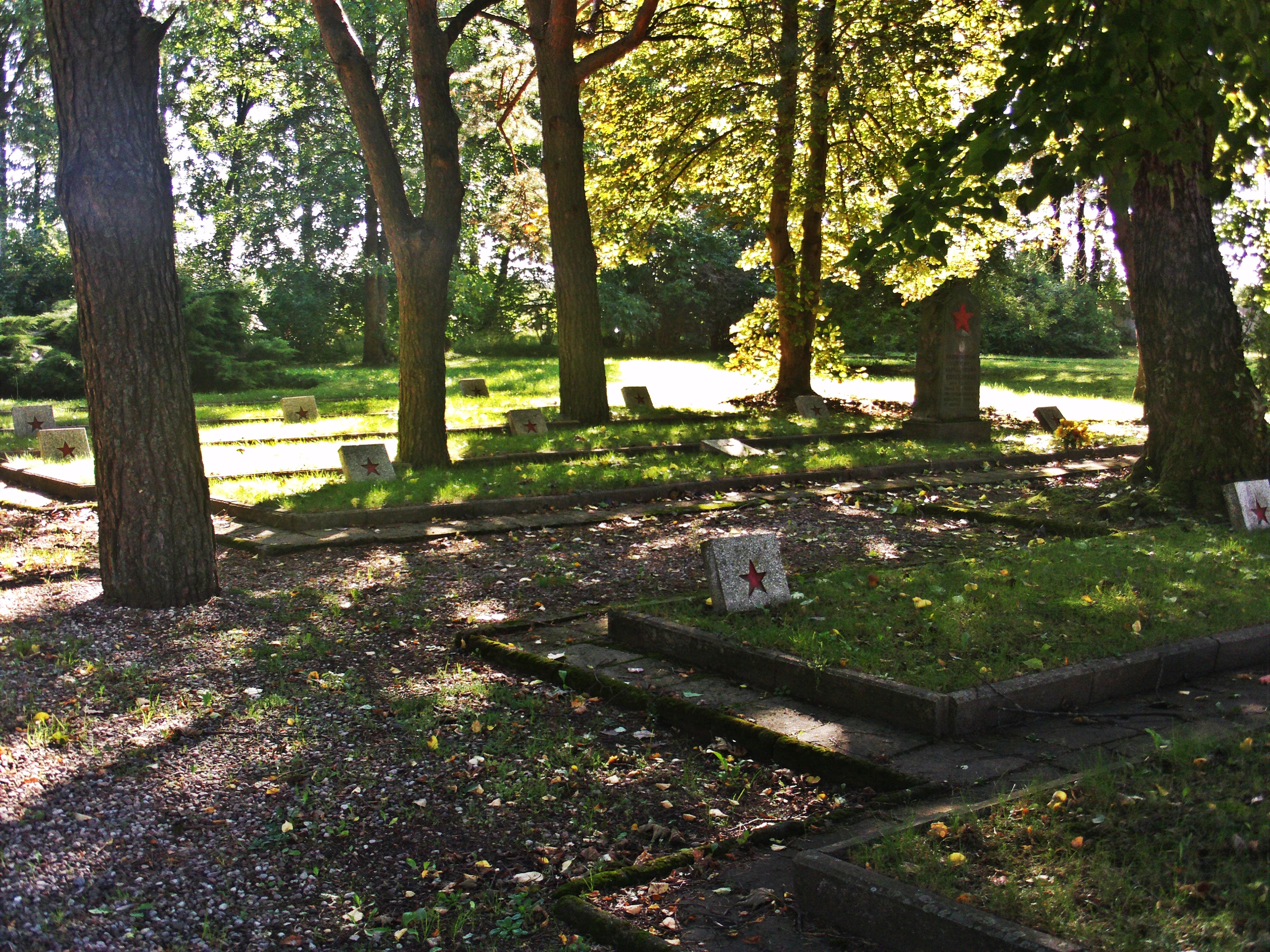 Suwałki - Cmentarz Żołnierzy Radzieckich w Suwałkach. Kwatery anonimowych jeńców. (zabytek nr A-832 z 26.08.1991)